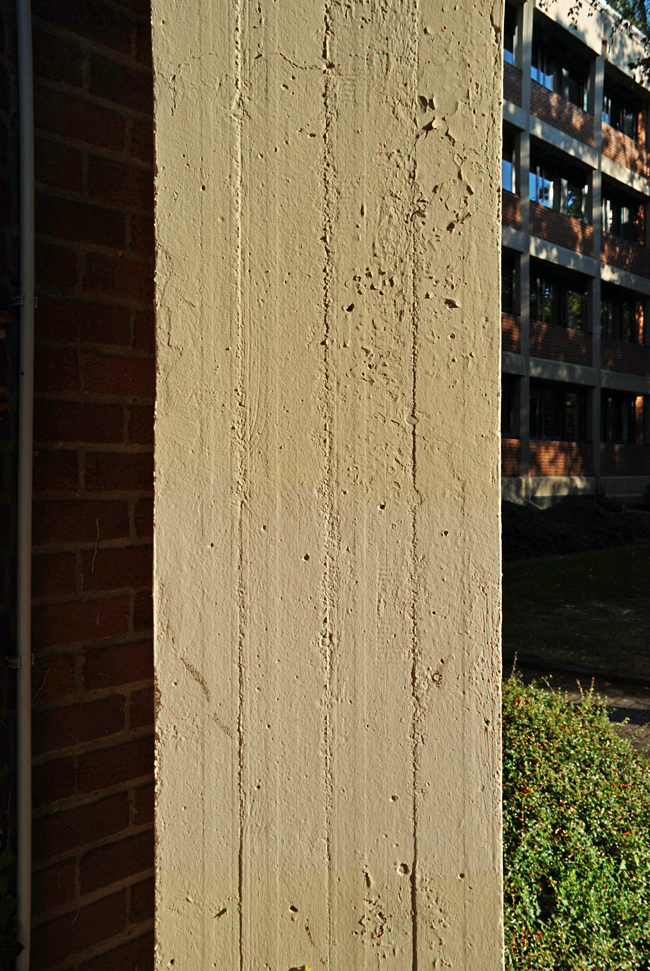 Belgique - Brabant wallon - Louvain-la-Neuve - Place Louis Pasteur - Mercator